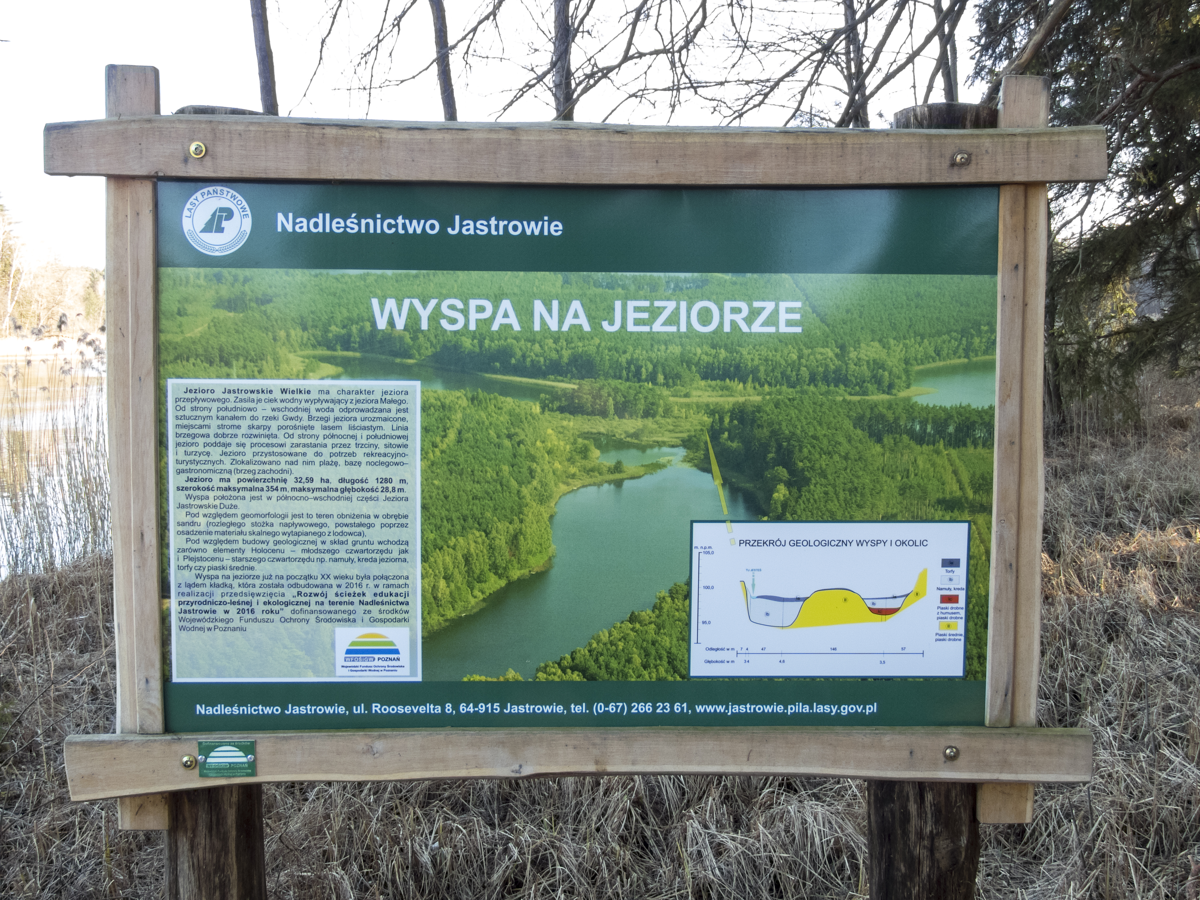 Jezioro Jastrowie Wielkie – tablica informacyjna Nadleśnictwa Jastrowie